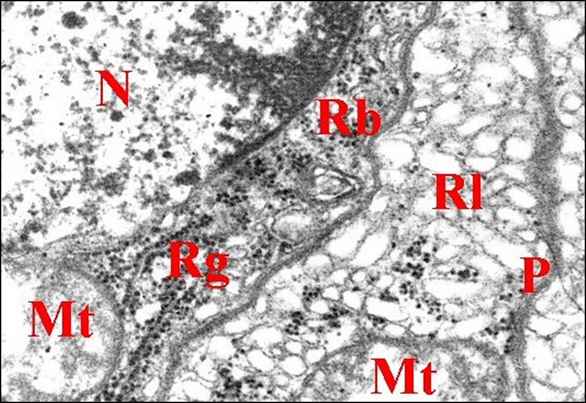 Epithélium de la chambre de la glande rostrale chez Argyrodes et ses organites. Microscopie électronique à transmission